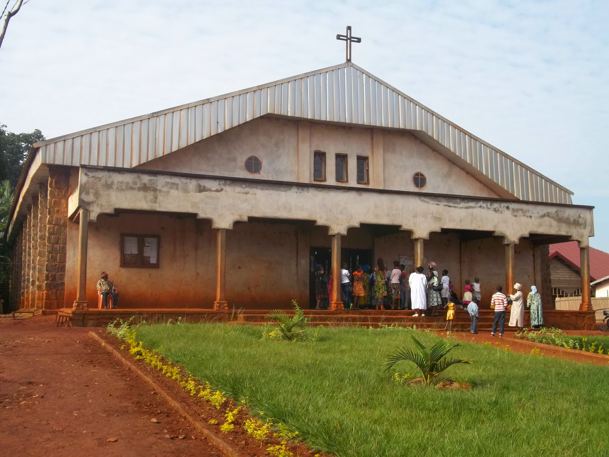 La Paroisse Saint Pierre de Bamougong est la principale église catholique construite dans le Groupement Bamougong, Arrondissement de Batcham, département des Bamboutos, Région de l'Ouest, Cameroun.